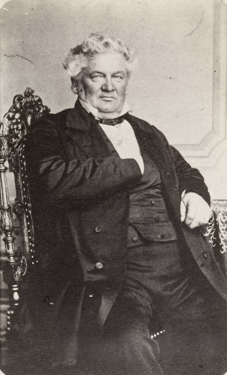 Mogens Thorsen